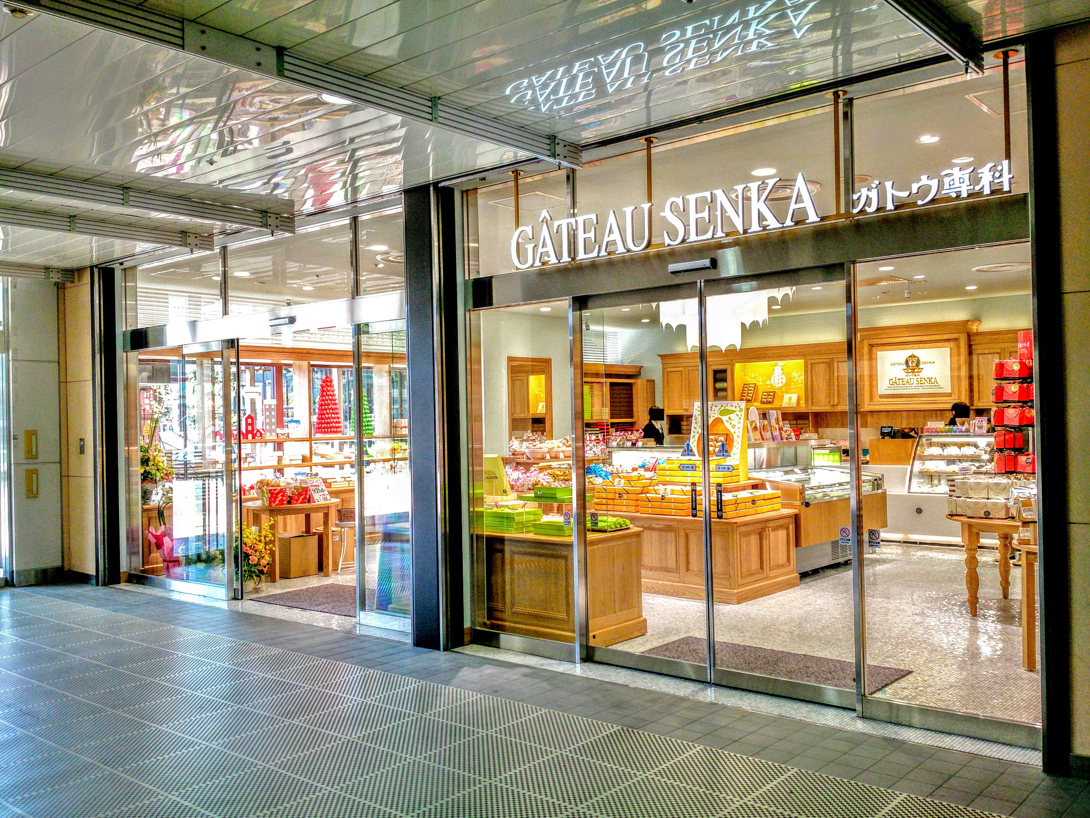 ガトウ専科・CoCoLo長岡店